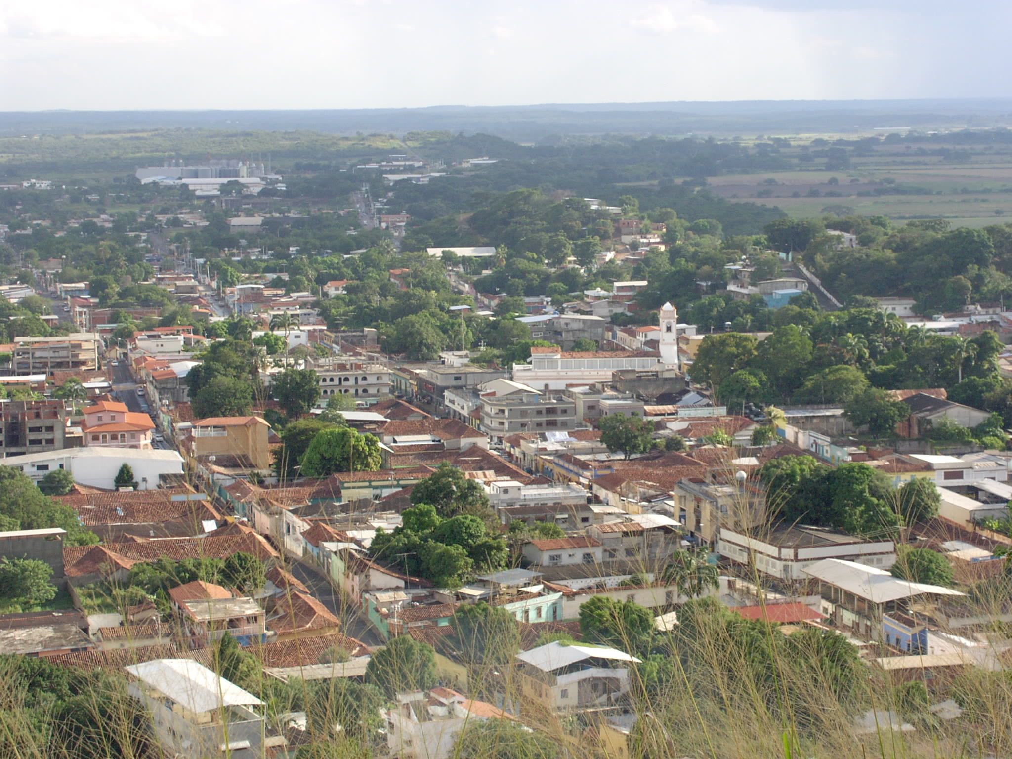 Vista panoramica de Altagracia de Orituco